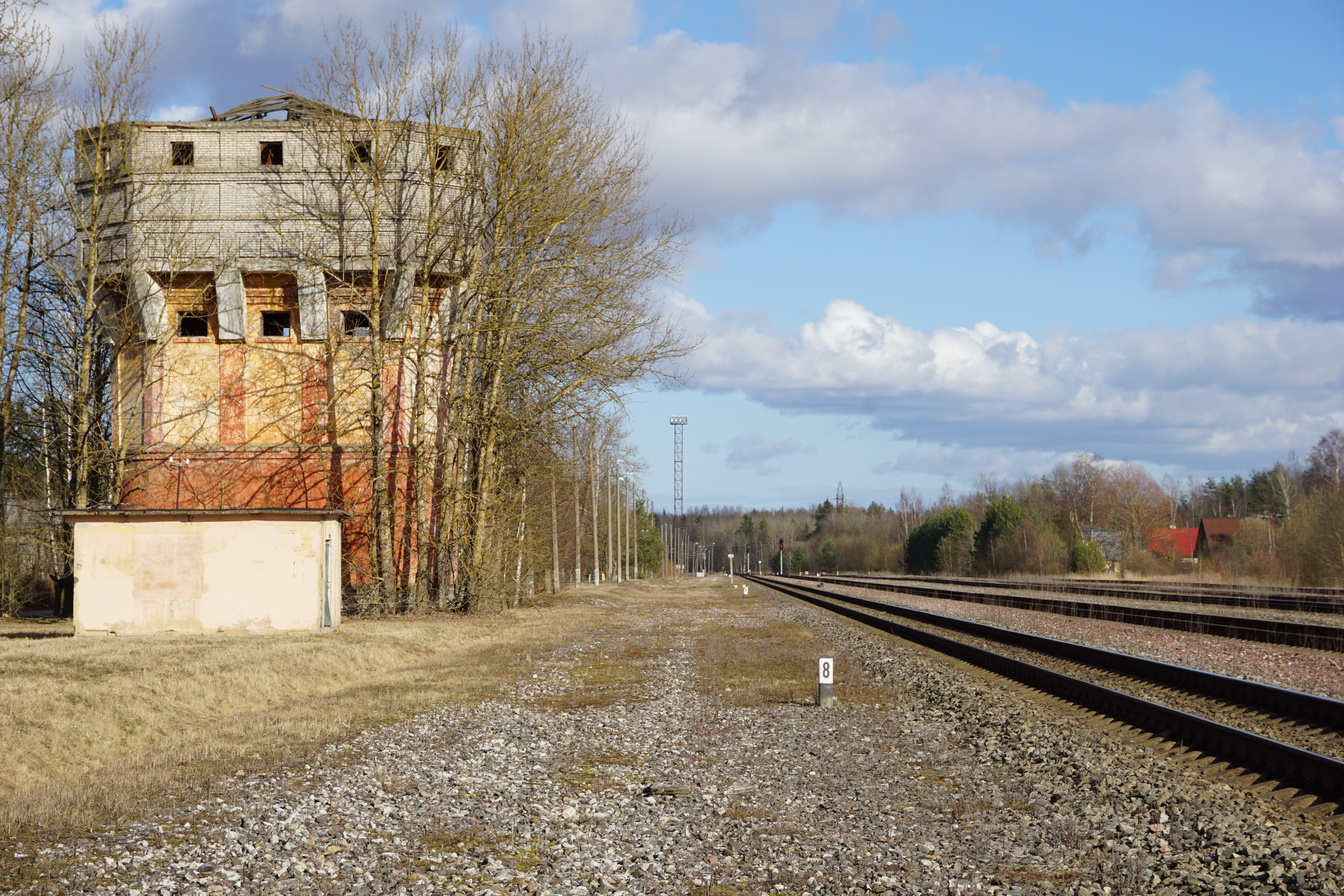 Püssi veetorn